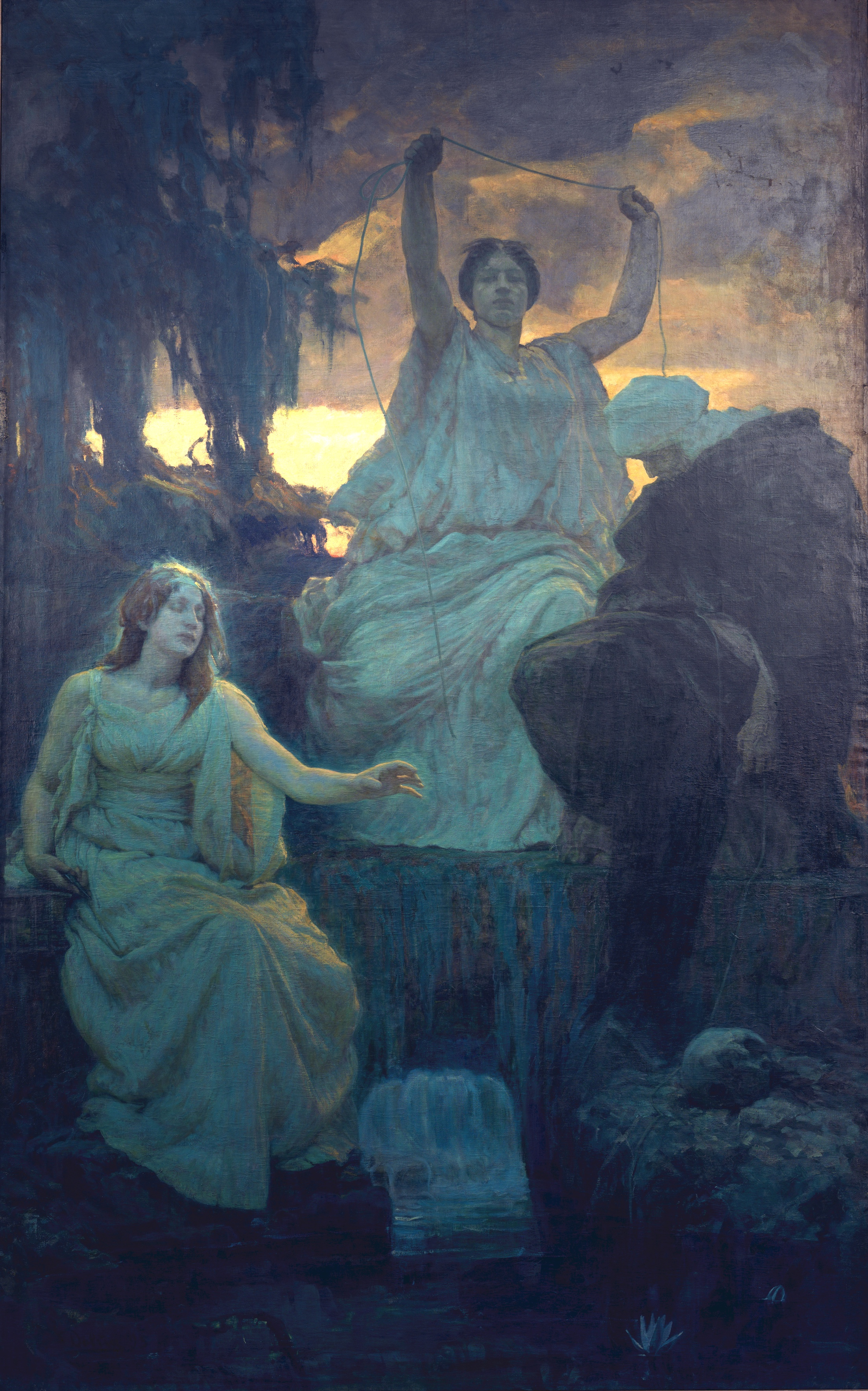 Alois Delug - Die Nornen, 1895, Öl auf Leinwand, cm 354 x 223 . Privatbesitz